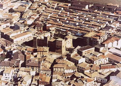 Castillo de Marcilla, antes de la restauración. Marcilla, Navarra.